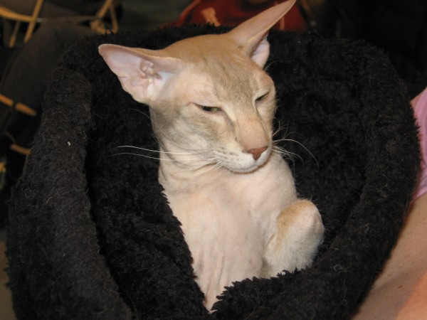 Own work.